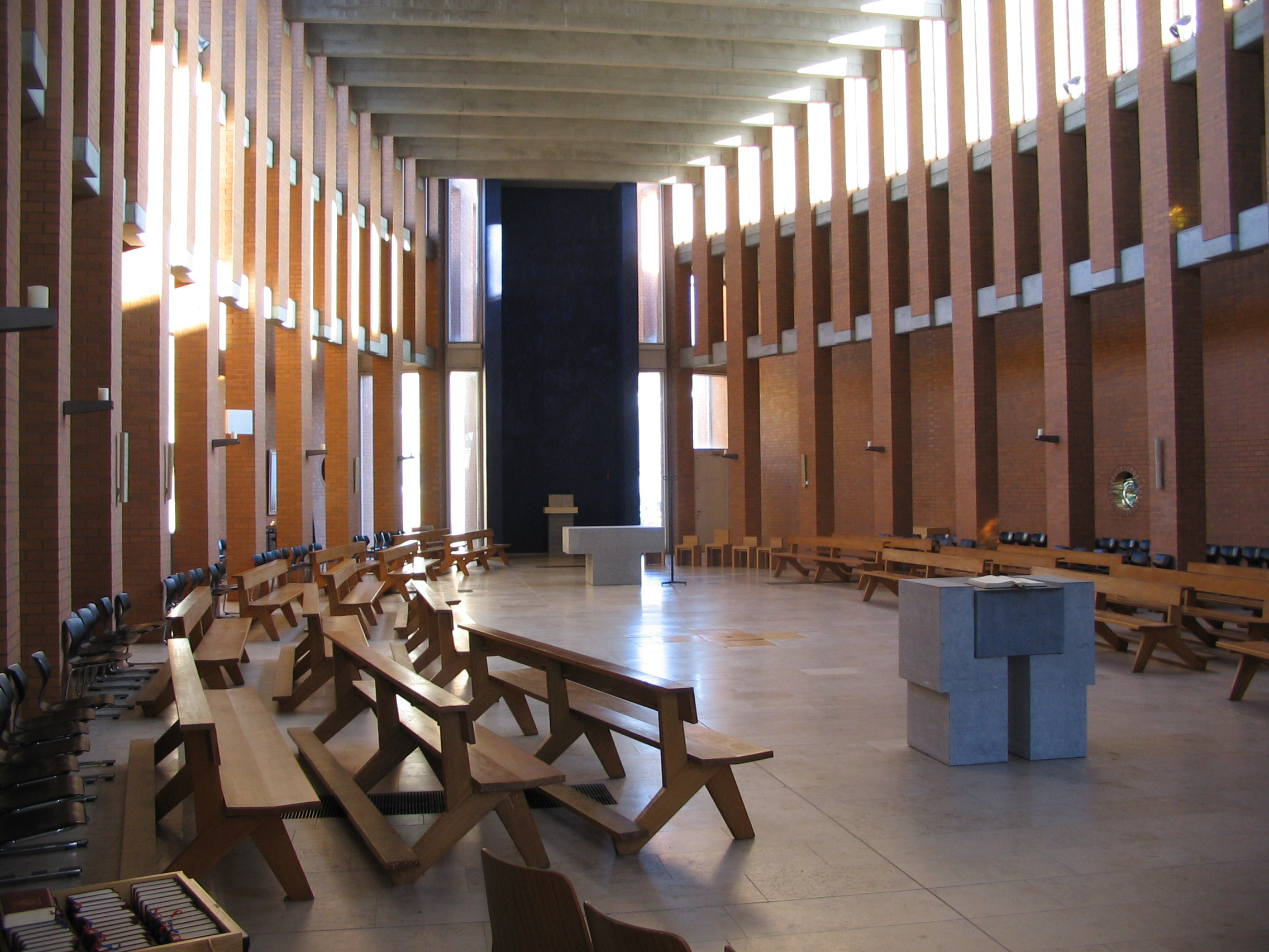 Der Innenraum der Kirche St. Christophorus in Westerland auf Sylt erinnert mit seinem länglich-ovalen Grundriss an ein Schiffsdeck